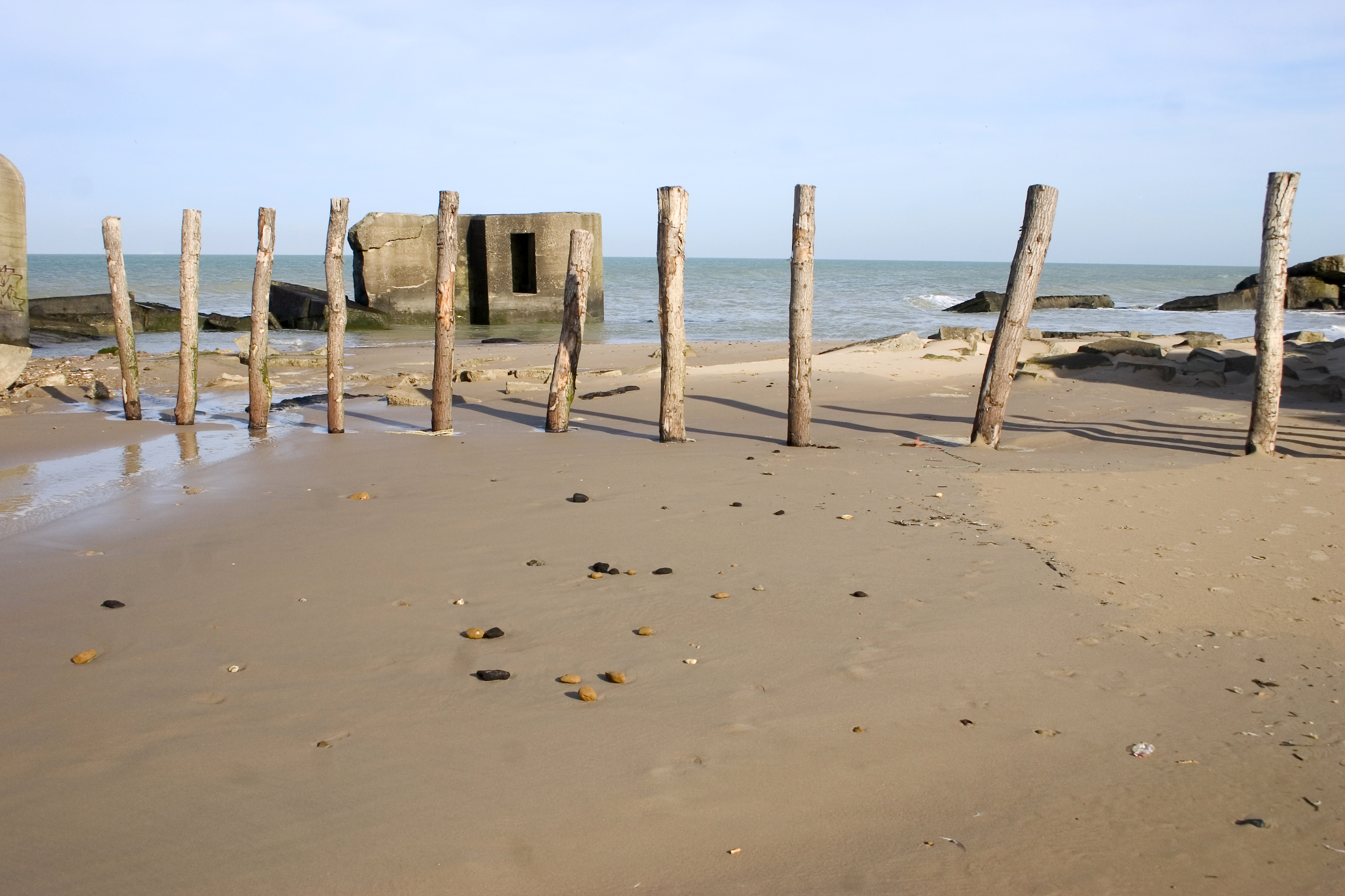 Les blockhaus sont dans la mer